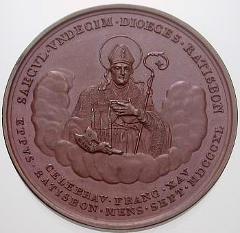 Medaille 1100 Jahre Bistum Regensburg 1840, mit Portrait Bischof Franz Xaver Schwäbl